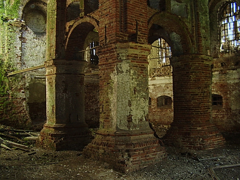 Быхаў. Інтэр'ер сінагогі